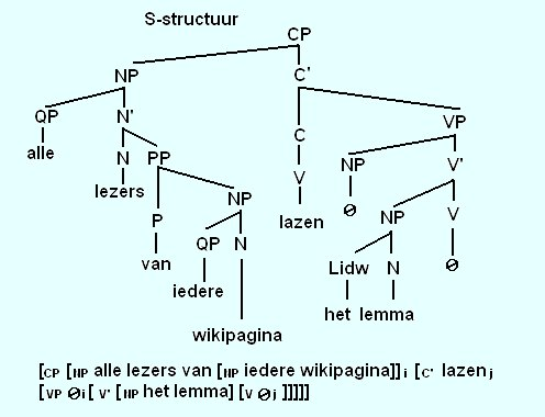 plaatje van een s-structuur, gemaakt voor in het artikel over Nederlandse taal en cultuur.